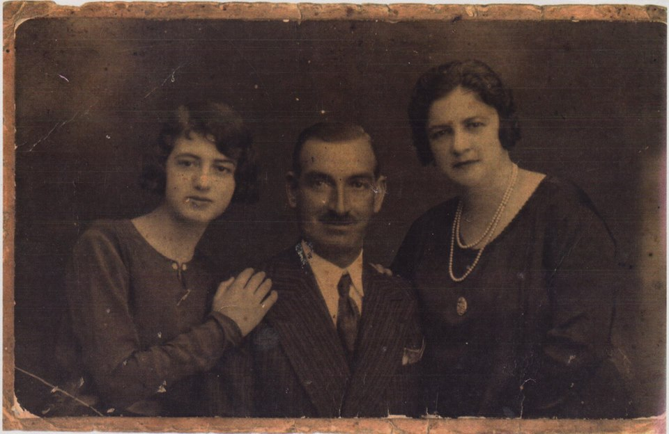 D. Francisco Morillas y Morillas, como el "alma mater" de Bellavista. Hizo una cierta fortuna en Argentina y al volver, compró un gran trozo de la finca matriz que después dio origen al Barrio. Junto con otros tres propietarios, parcelaron y vendieron dichas parcelas y la Barriada fue creciendo. A su trozo de finca la bautizó con el nombre de Bellavista, unos dicen que en honor al barrio bonaerense dónde vivió en Argentina, cosa no comprobada y otros achacan el nombre a las bellas vistas que desde aquí se tienen de la capital. Yo me inclino a pensar que se debe a esta última razón, puesto que su empeño fue hacer una urbanización, casi de recreo, para una cierta burguesía acomodada sevillana y qué mejor lugar que uno que tuviera bellas vistas y un aire límpido y sano, como este cerro tenía entonces. Además, esto se corrobora con la abundancia de chalets magníficos que jalonaban la antigua Cañada Real de la Armada (Carretera vieja de Dos Hermanas), adonde esa burguesía acudía en, sobre todo, los meses del verano huyendo de las altas temperaturas del centro de Sevilla. Con el paso del tiempo, el nombre que Morillas había elegido para su trozo de finca, se trasladó a la totalidad del Barrio, sustituyendo al antiguo y coetáneo de Barriada de La Salud. Hubo épocas en las que se usaba indistintamente un nombre u otro. Esta foto, por su importancia, abre el libro "Bellavista en imágenes", editado en 1999 y del que aun, en alguna librería del Barrio, quedan algunos de los dos mil ejemplares que se editaron.